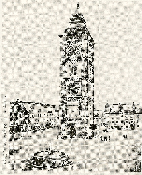 Postkarte